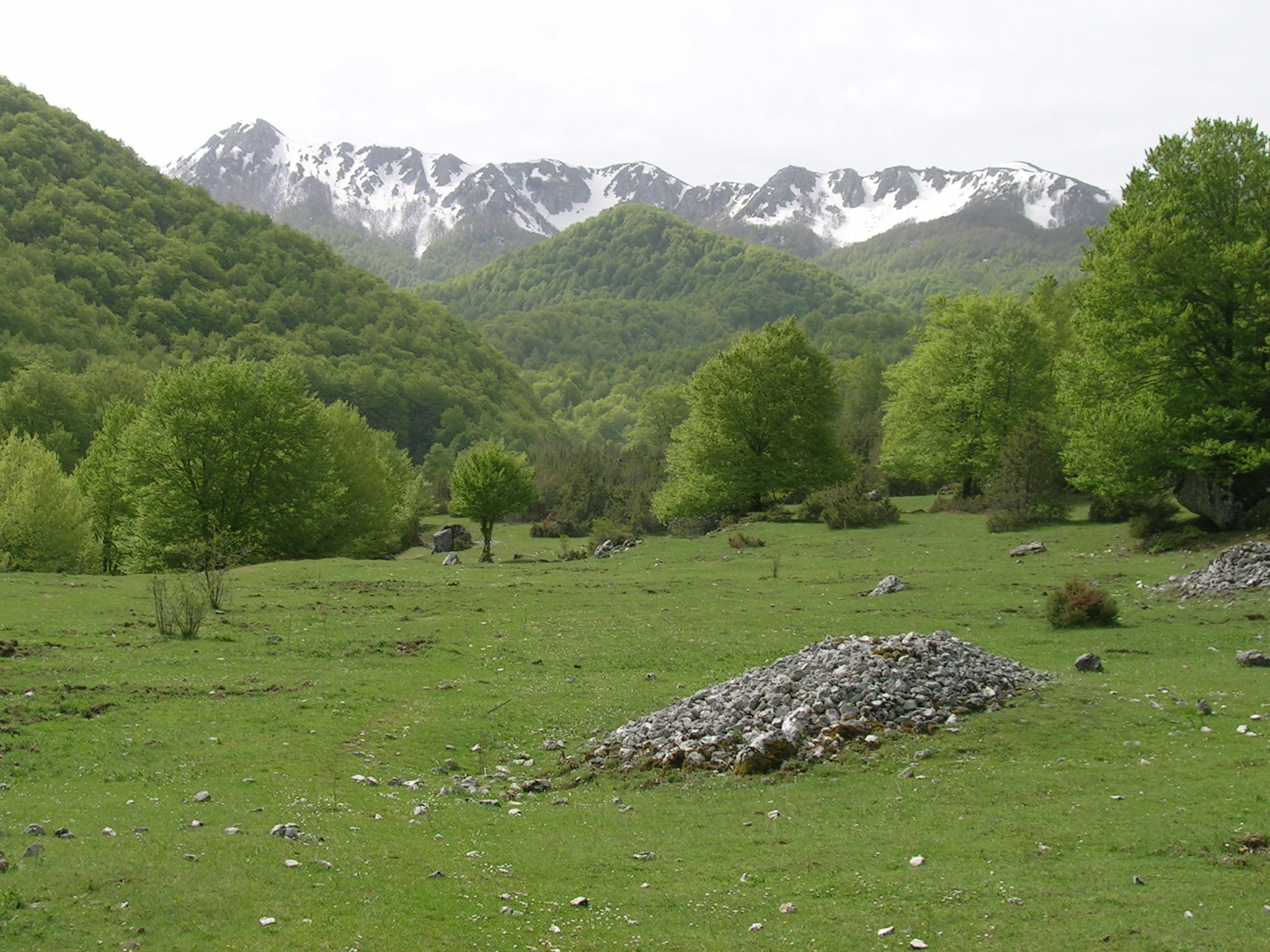 La Valfondillo e Serra delle Gravare. Valle Fondillo. In fondo la Serra delle Gravare, col Monte Irto (a sinistra, 1960m).